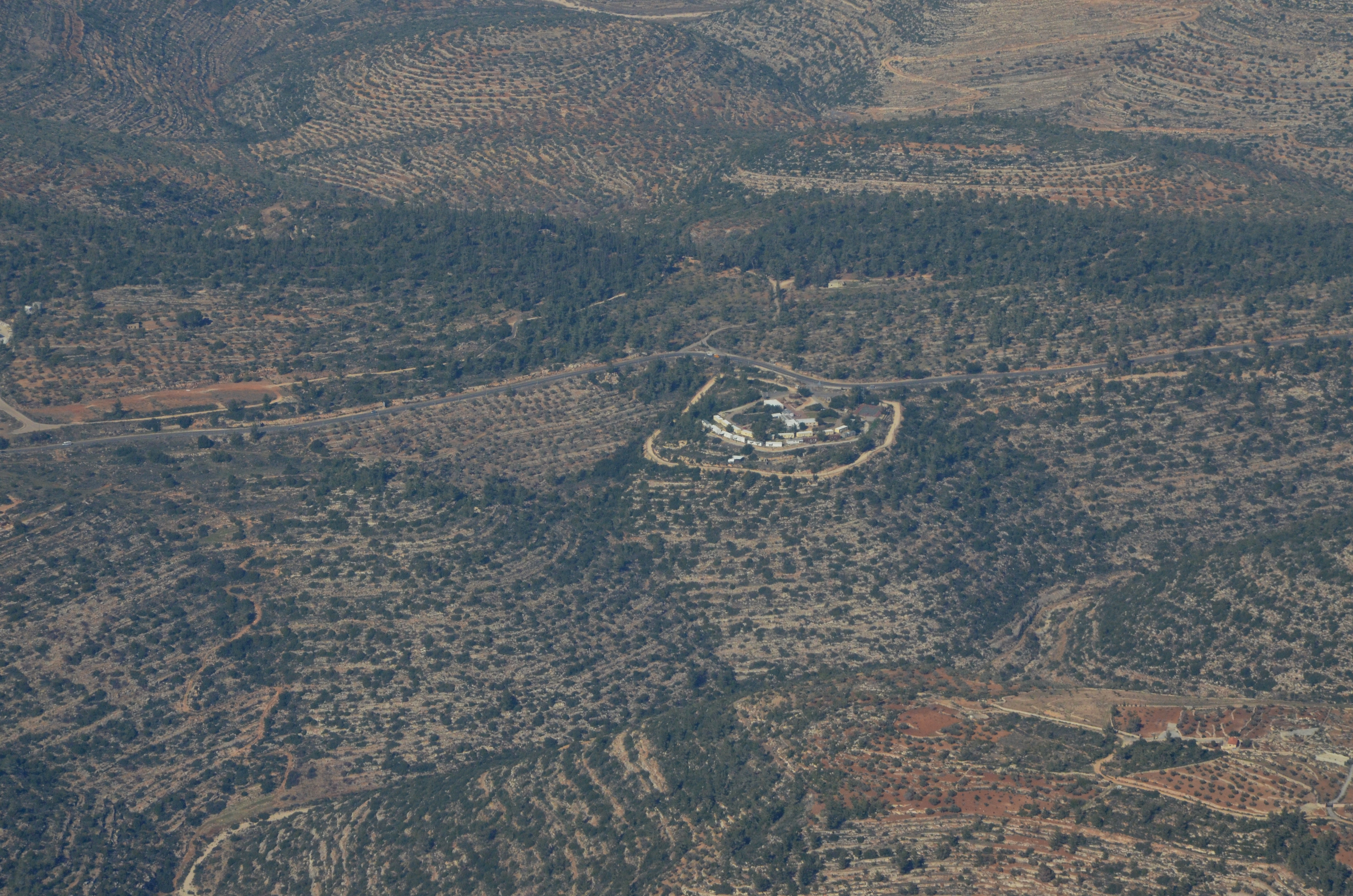 מכינת אלישע (סמוך לישוב נוה צוף -חלמיש בבנימין)